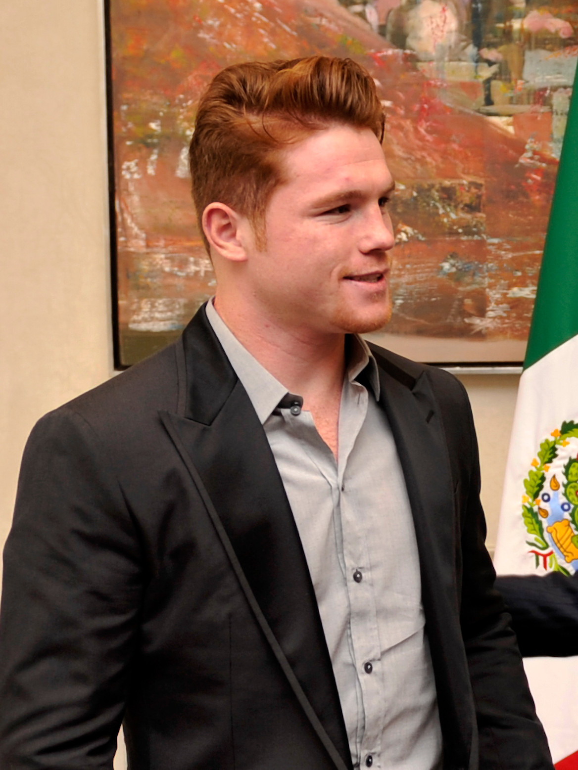 El Presidente Enrique Peña Nieta y el boxeador Saúl 'Canelo' Álvarez, durante un encuentro privado en la residencia oficial de los Pinos, 29ABRIL13.Visita del boxeador Residencia oficial "Los Pinos"